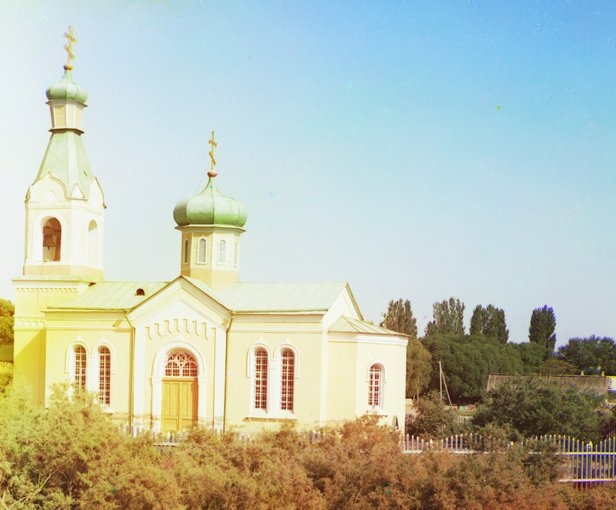 Sabirabad (Petropavlovka).Kilsə